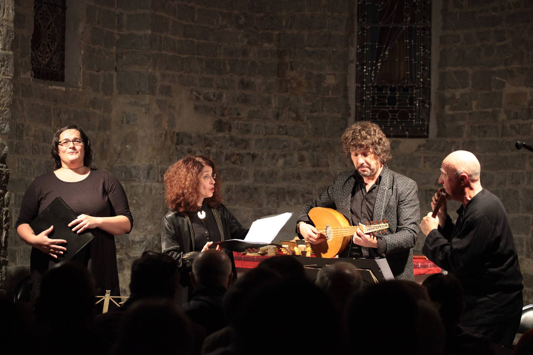 Octobre 2015. Musiques en Pic Saint Loup Photo Bruno Garcia